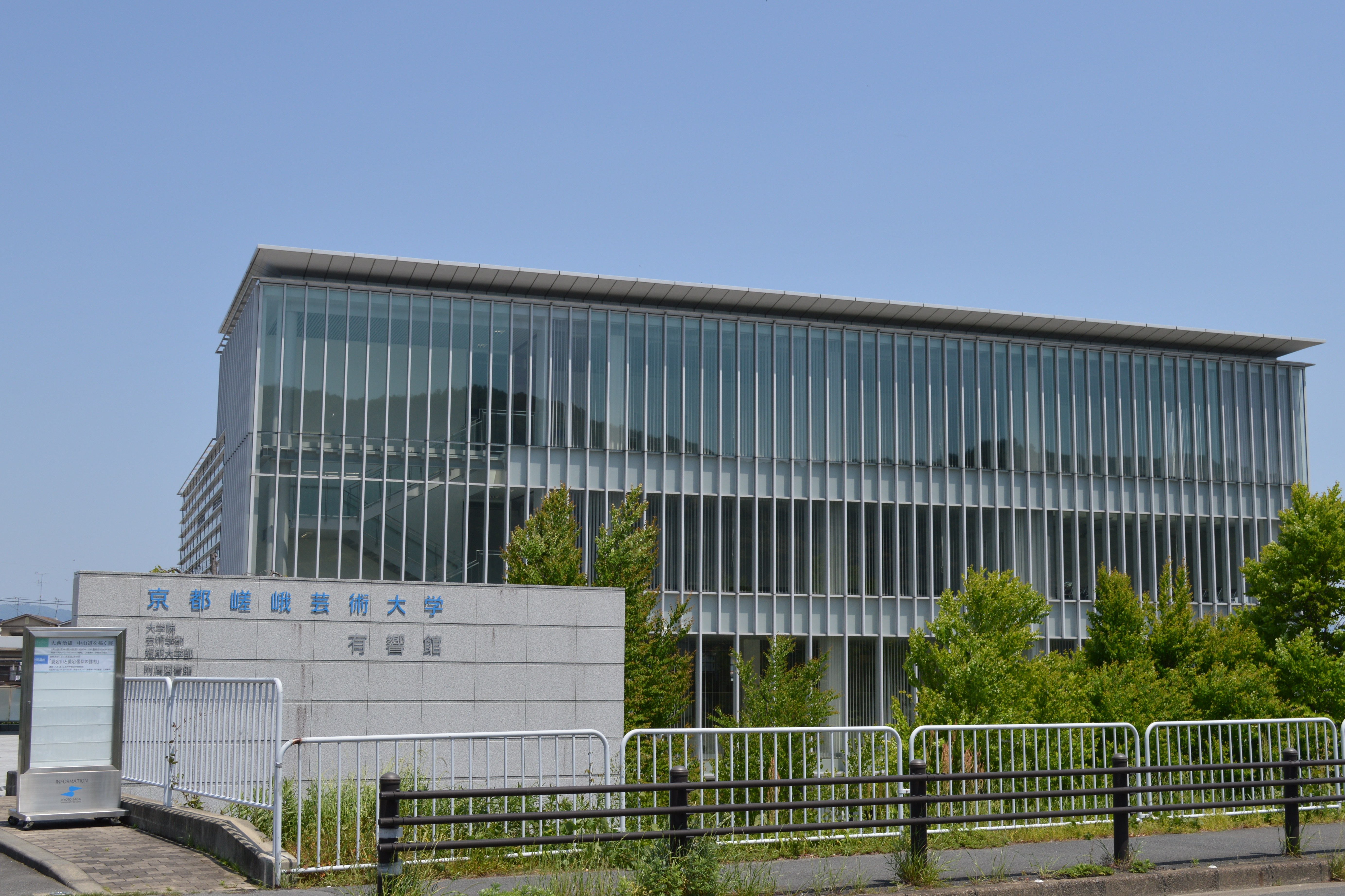 京都嵯峨芸術大学罧原（ふしはら）キャンパスの有響館